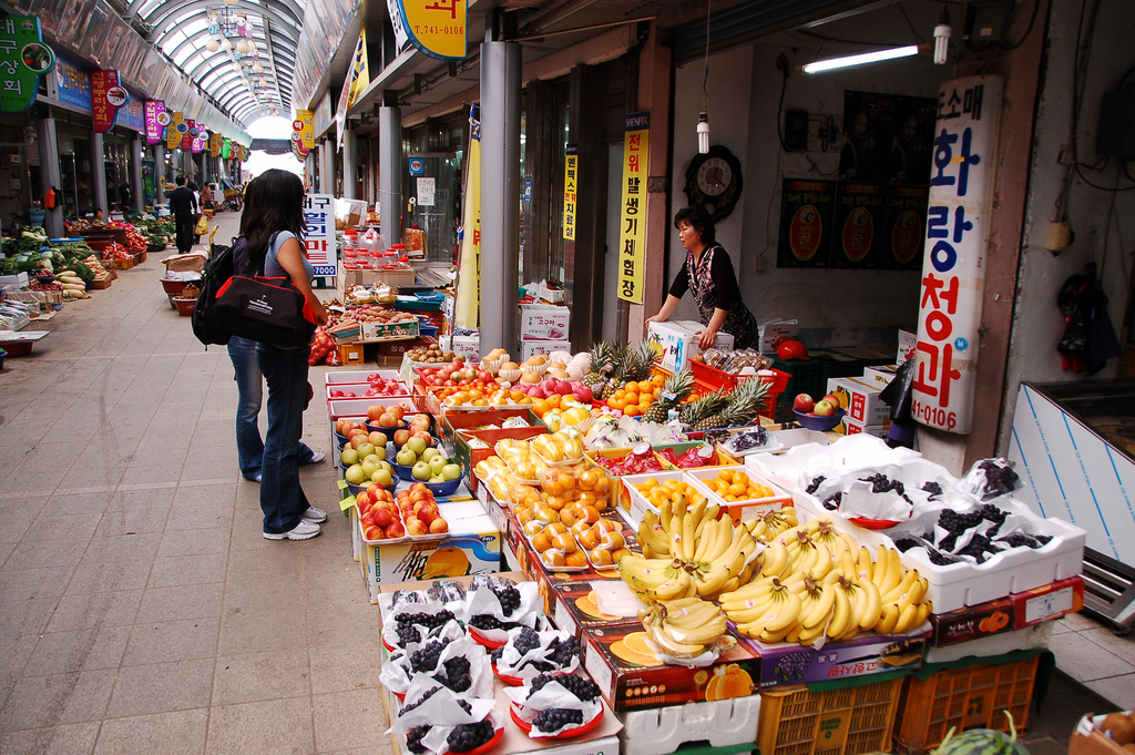 seongdong market ????